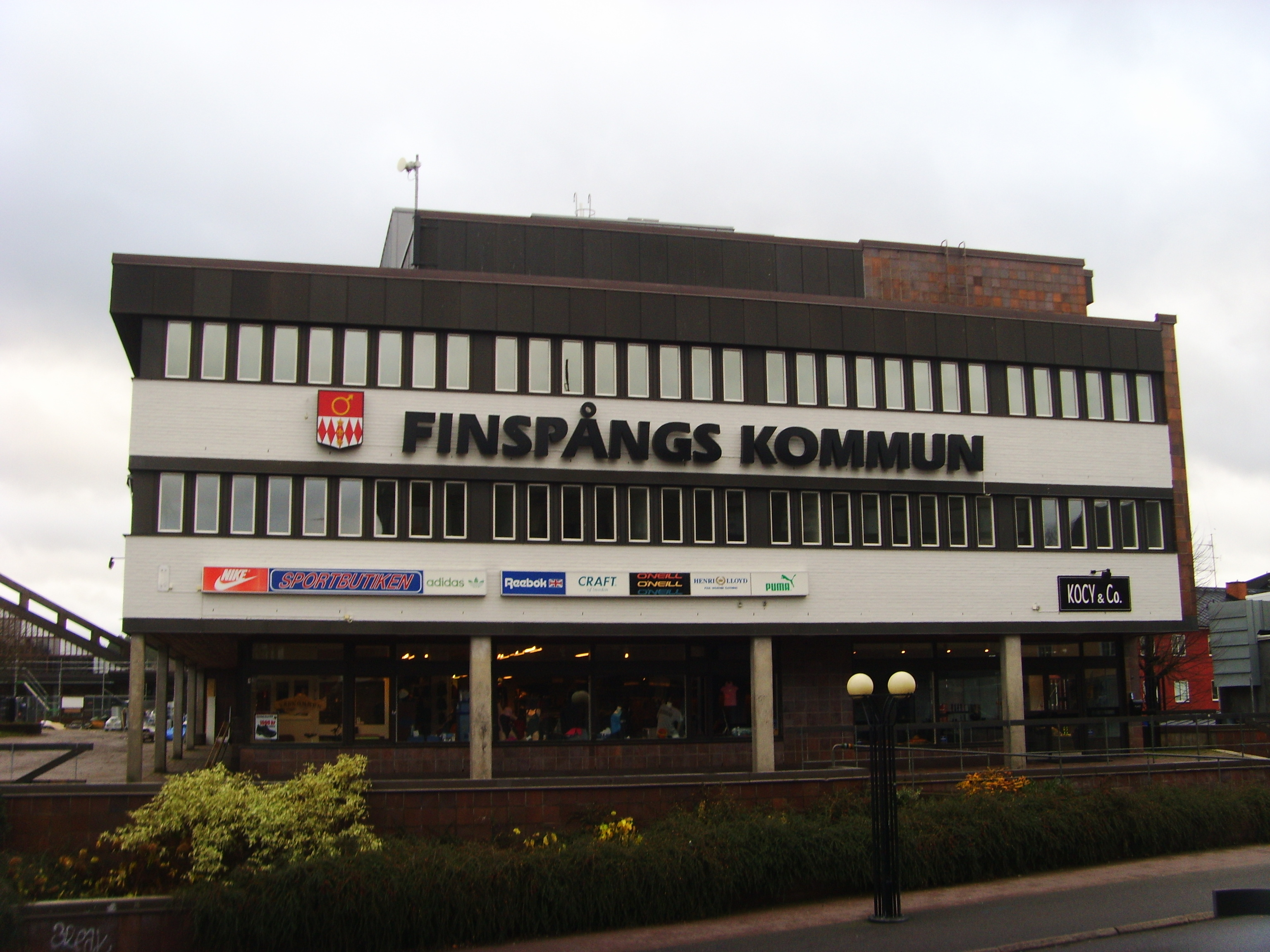 Finspångs centrum, kommunkontoret.